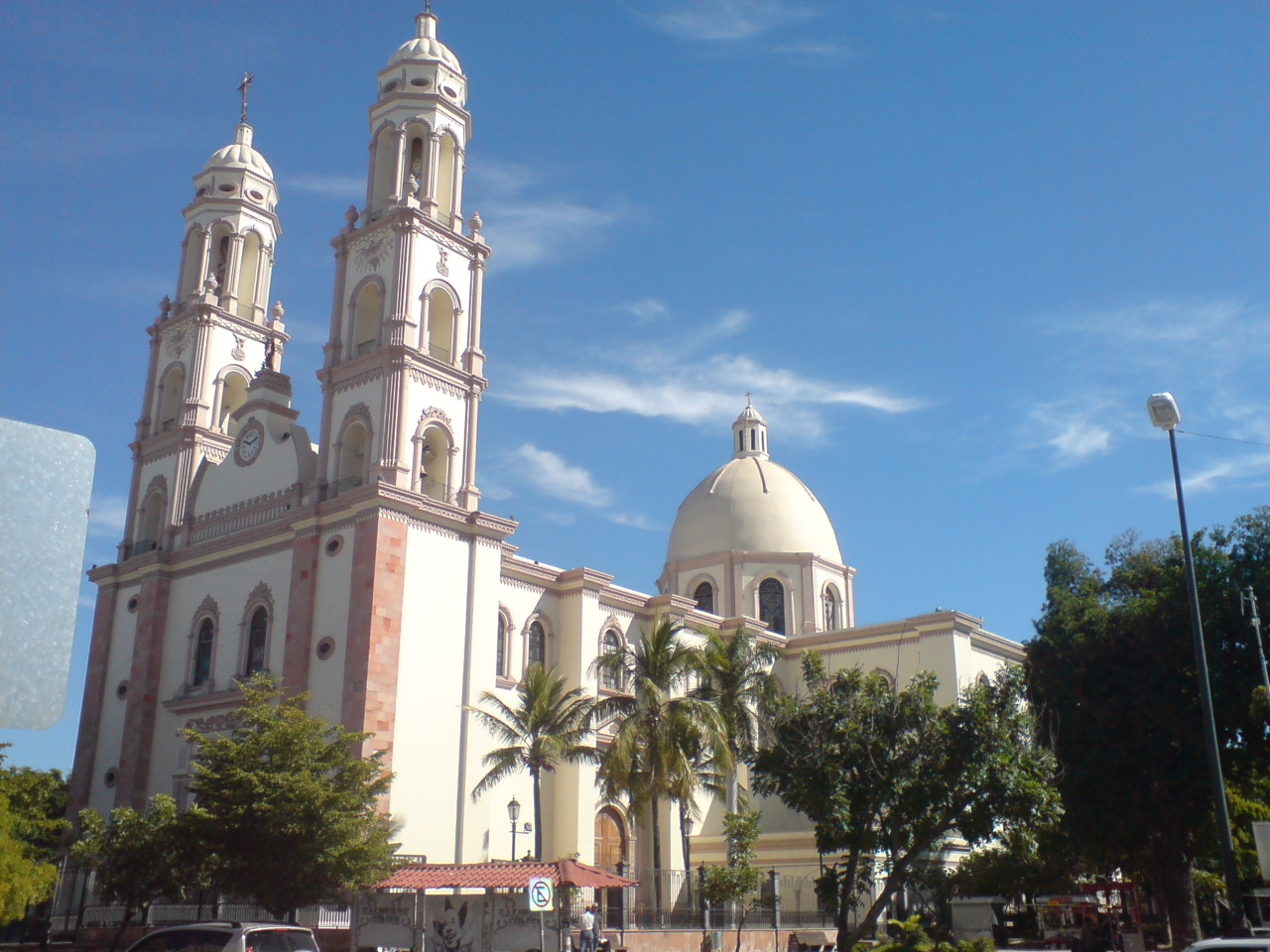 bonita tierra!